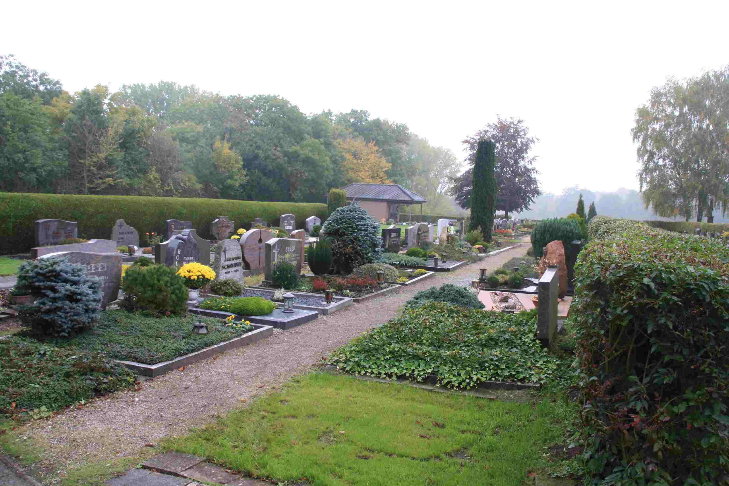 Friedhof nach Osten 1